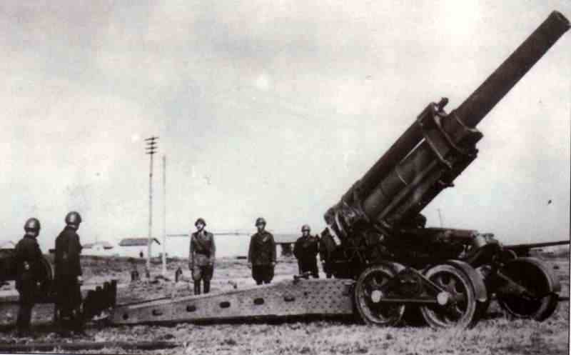 obice 210/22